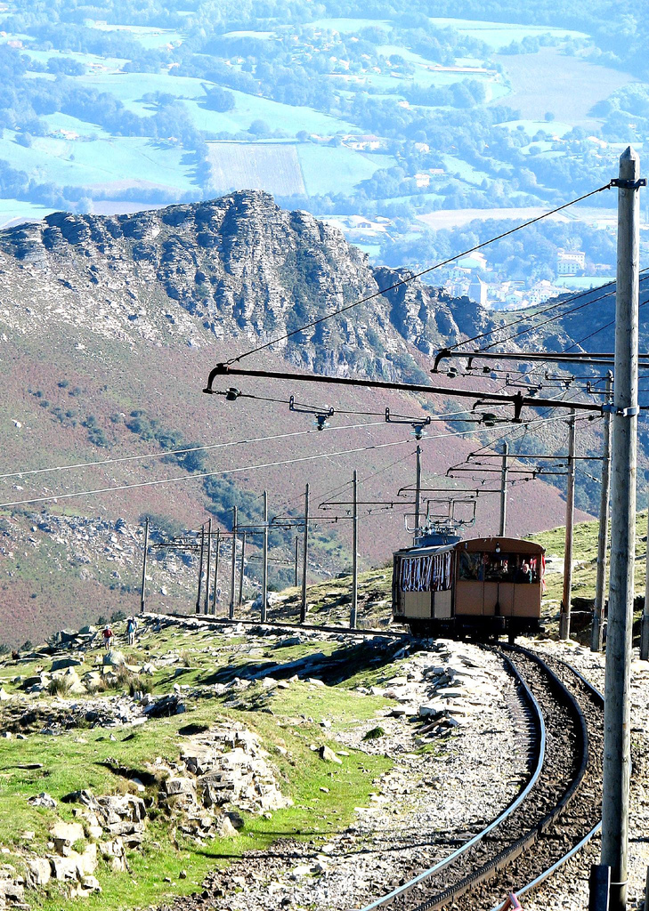 Petit train de la Rhune France